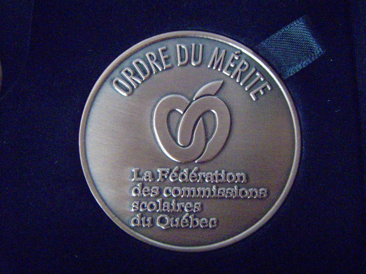 Médaille de la Fédération des commissions scolaires du Québec pour services rendus à l'éducation, 2008